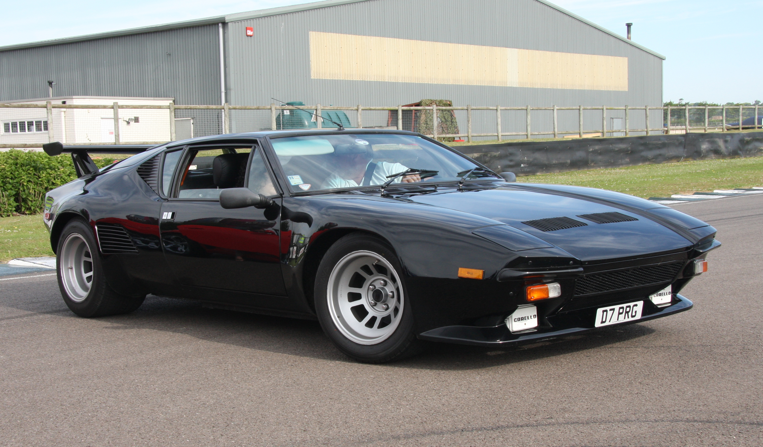 De Tomaso Pantera GT5-S